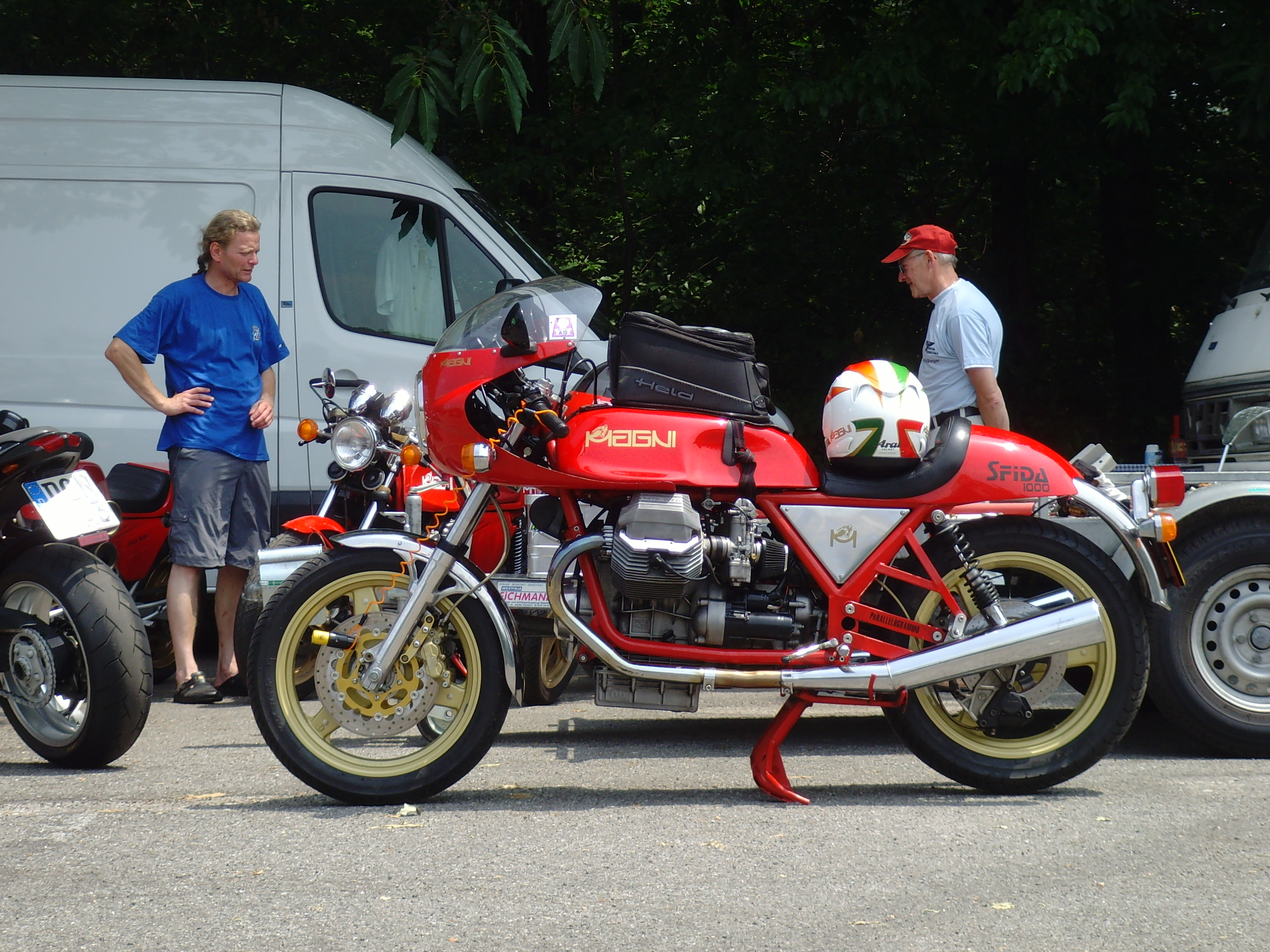 Magni Sfida 1000 monoposto del 1989